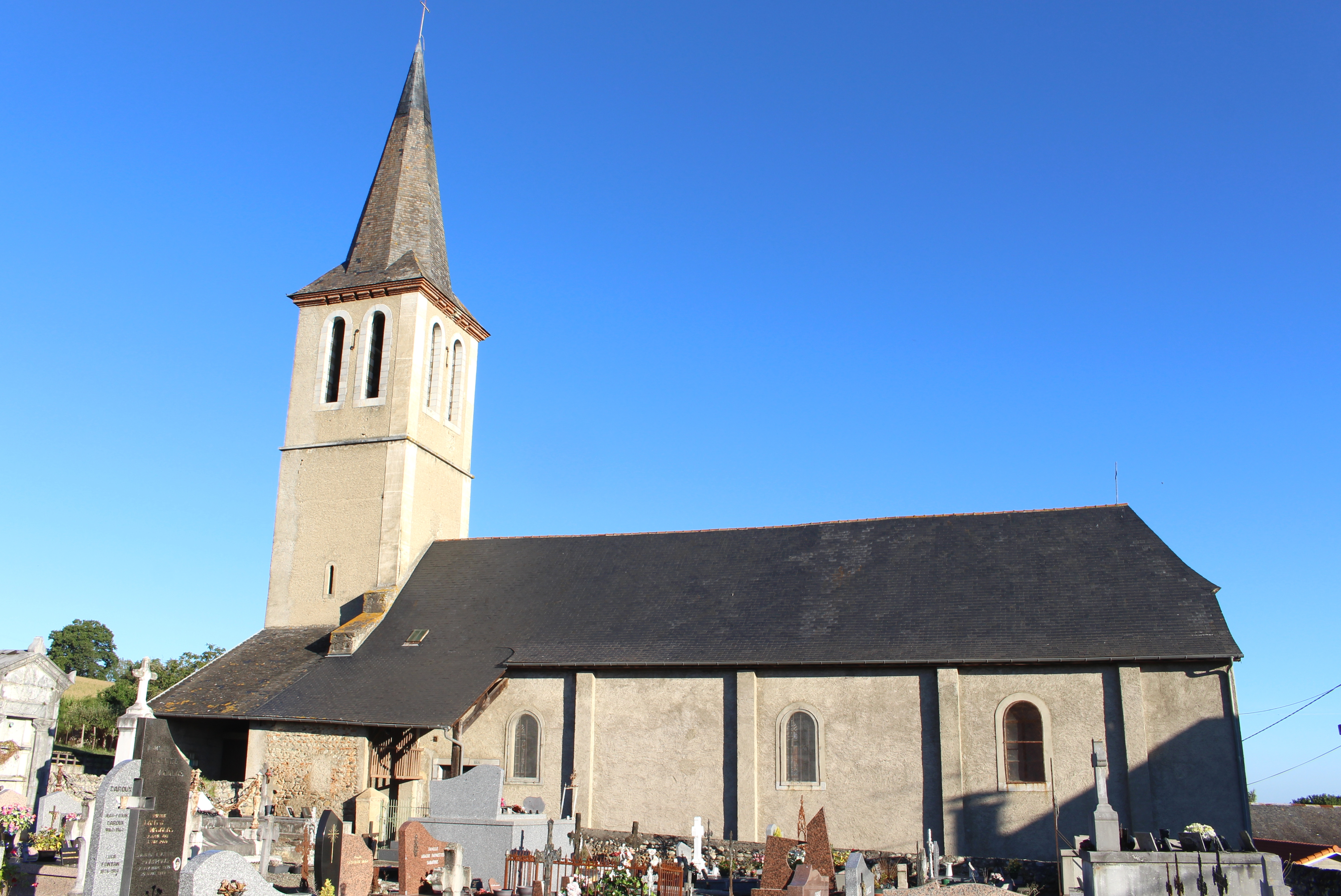 Église Notre-Dame de l'Assomption de Sarrouilles (Hautes-Pyrénées)